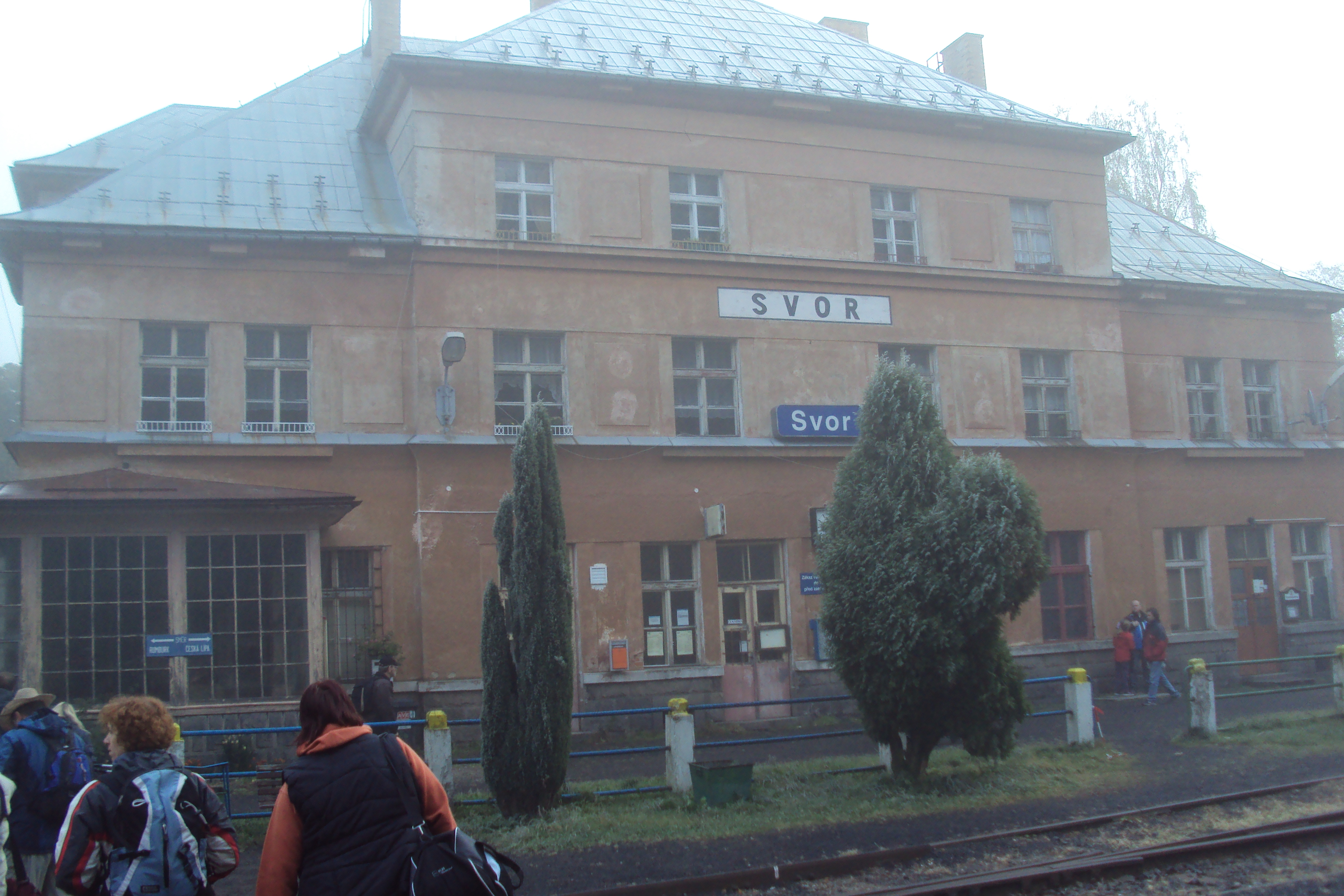 Železniční stanice Svor v mlze, trať 080